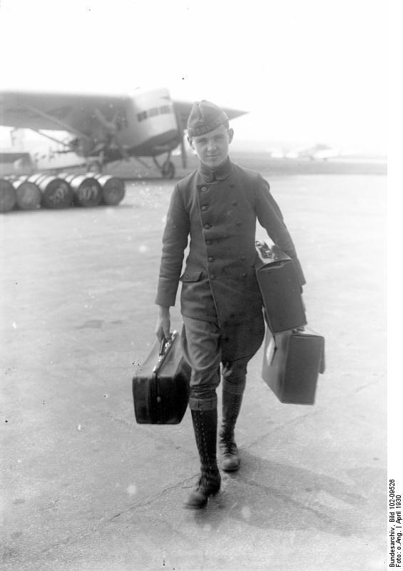 Die Flugsaison hat wieder begonnen! Der Flugzeugboy, welcher das Handgepäck der Reisenden Flugpassagiere von und zu den Maschinen bringt, in seiner adretten Kleidung.